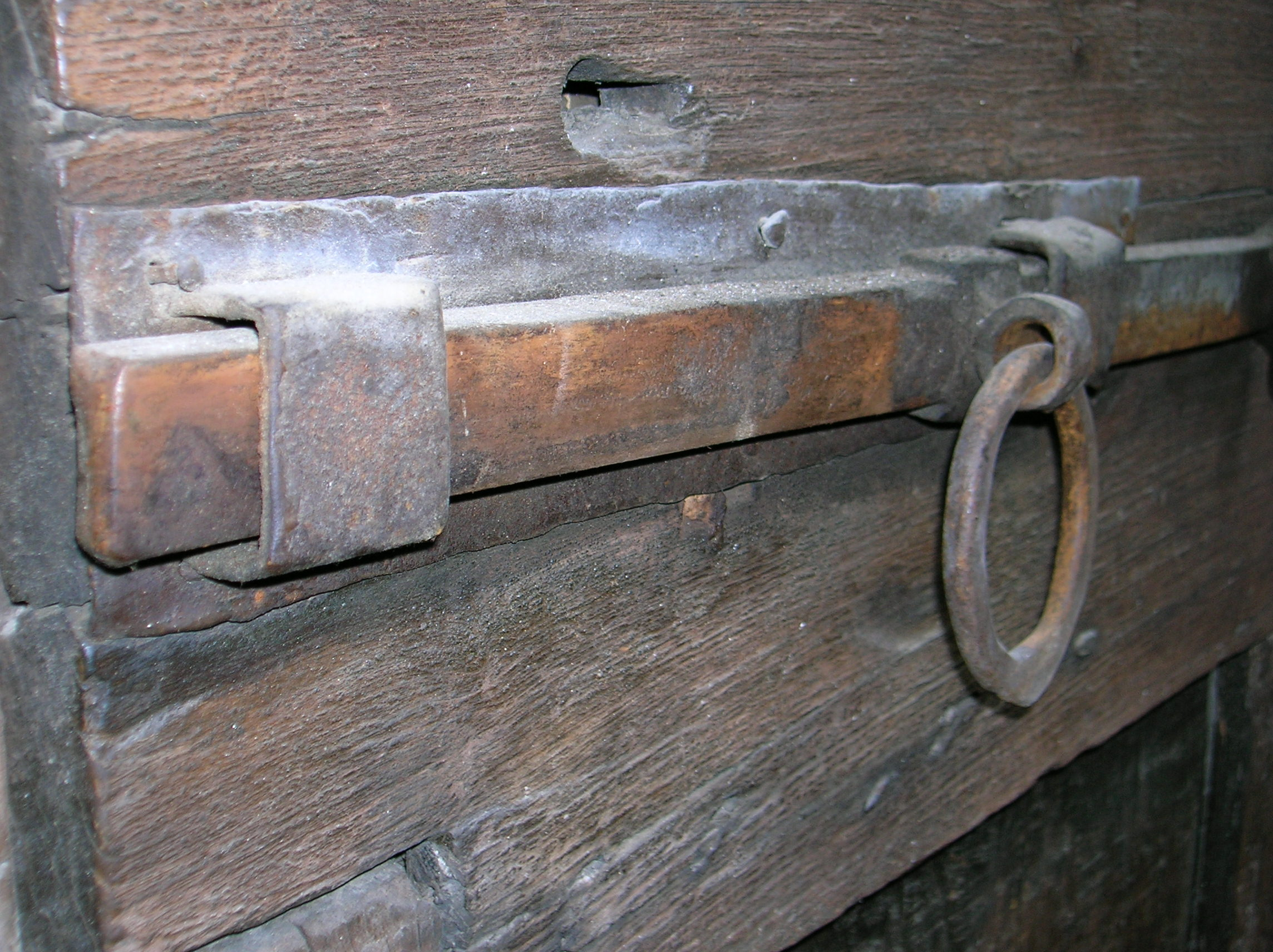 chiavistello dell'entrata di casa Magnocavallo, ad Asso